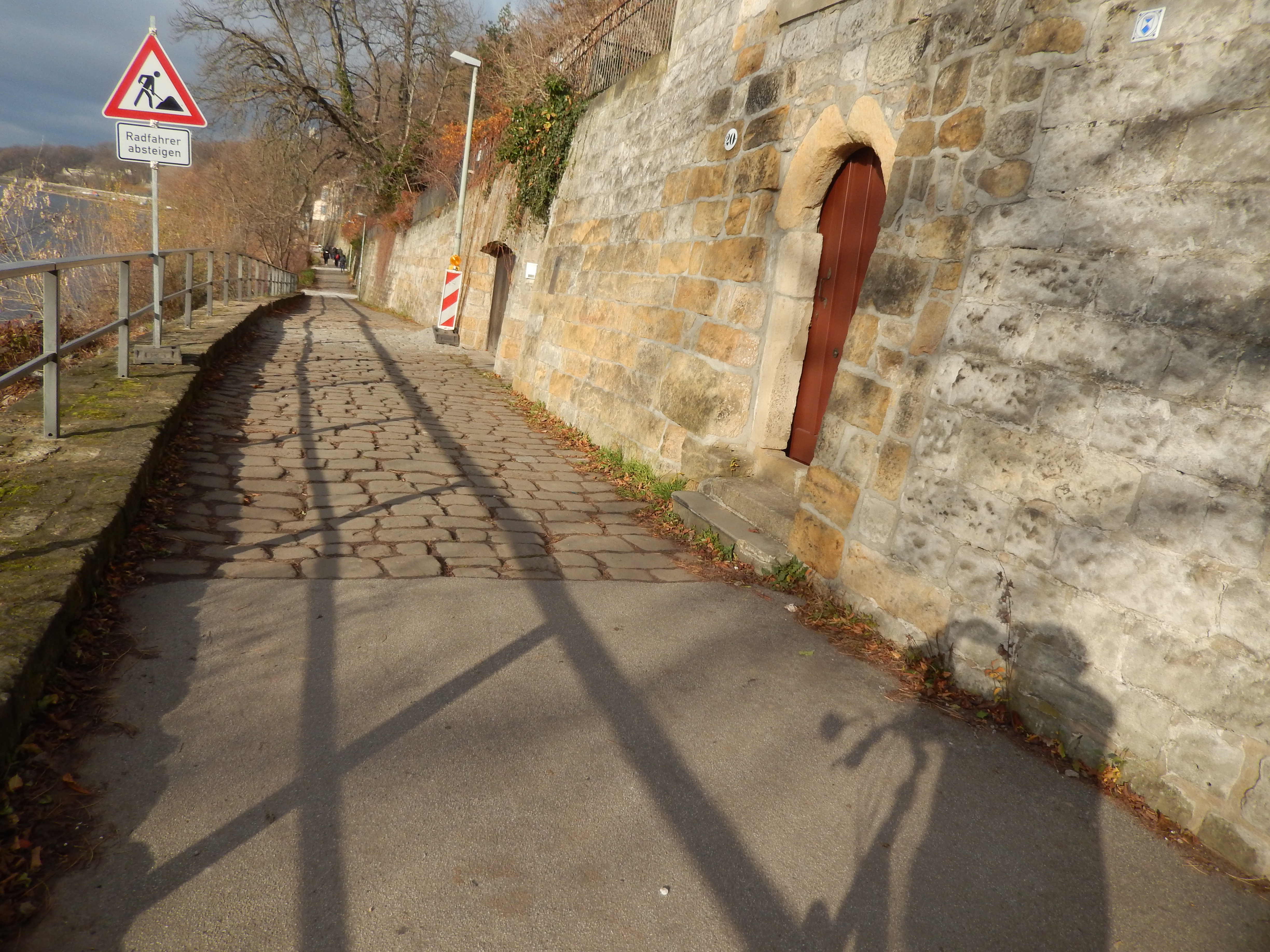 Dresden Körnerweg: Der Körnerweg entstand bereits vor dem Jahr 1700 und verband als Marktweg das Dorf Loschwitz mit der Stadt Altendresden (Dresdner Neustadt). Die Händler und Bauern brachten so ihre Erzeugnisse in die Stadt. Im Zeitalter der Industrialisierung benutzten die Bomätscher (Schiffszieher) den Weg zum Ziehen der Elbkähne. Der Weg wurde um 1908 verbreitert und endete an der Holzhofgasse. Heute wird er von Wanderern und Spaziergängern genutzt und ist Bestandteil des Elberadweges. Sanierung ist geplant.